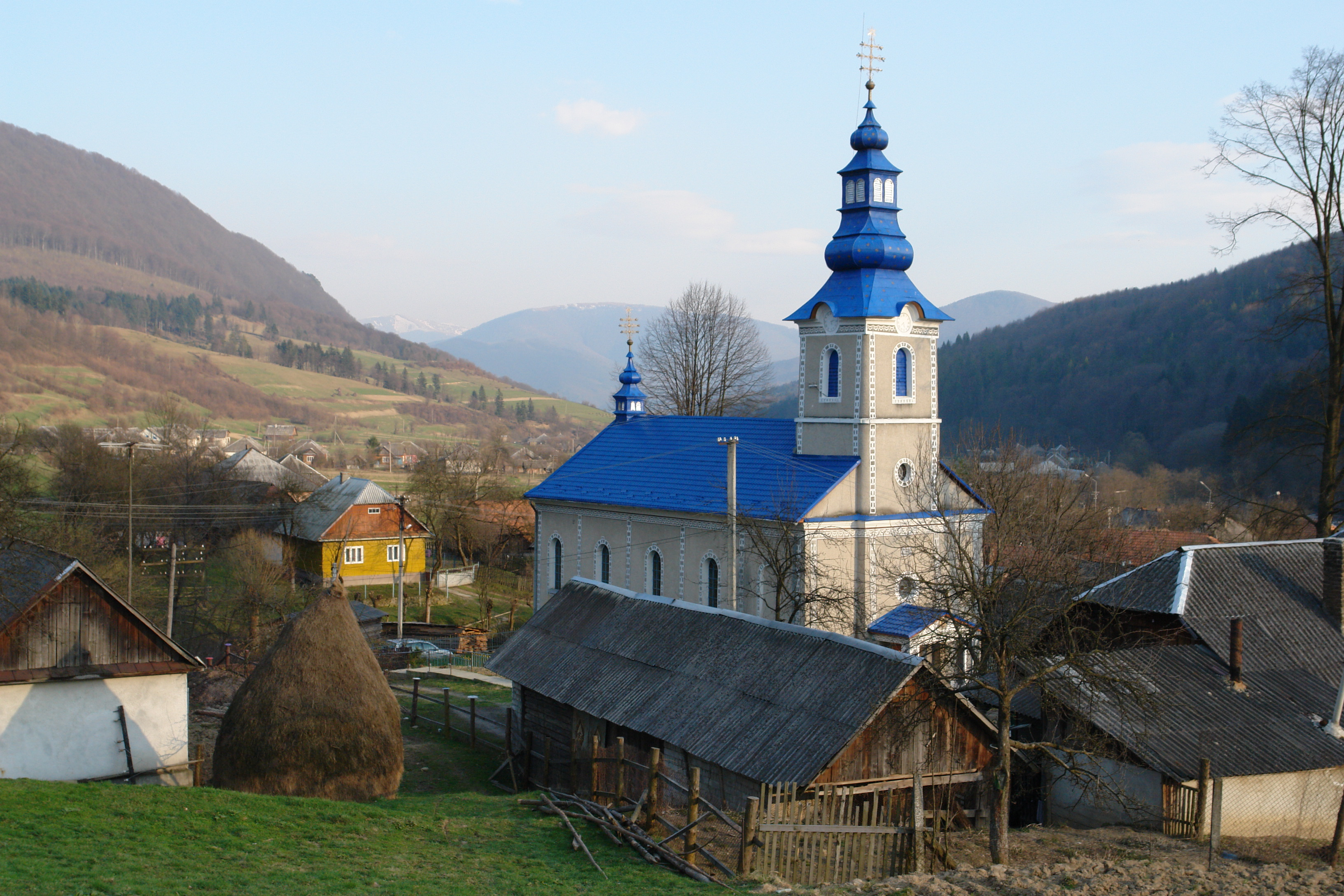 Szarvasháza - Zhdeniievo (Kárpátalja)Zhdeniievo settlement in Volovets Raion (district) of Zakarpattia Oblast (region).